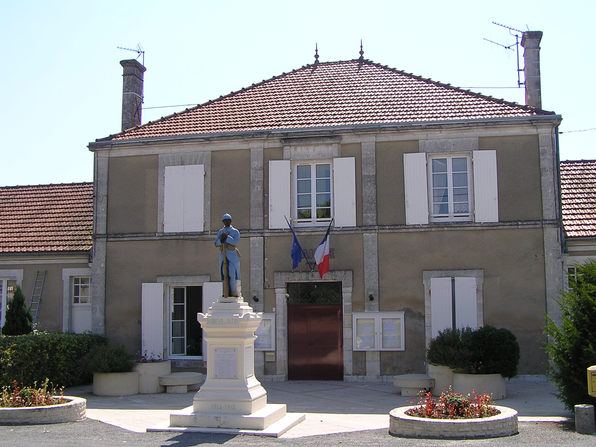 mairie de Saint-Genis-d'Hiersac